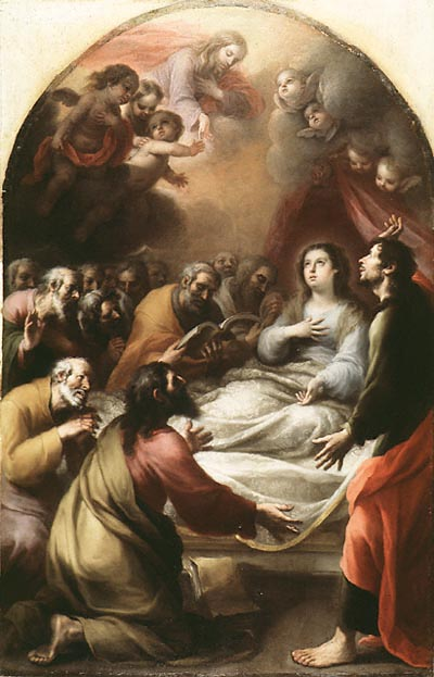 Esteban Márquez de Velasco, Dormición de la Virgen, óleo sobre lienzo, 252 x160 cm., Art Gallery of Ontario